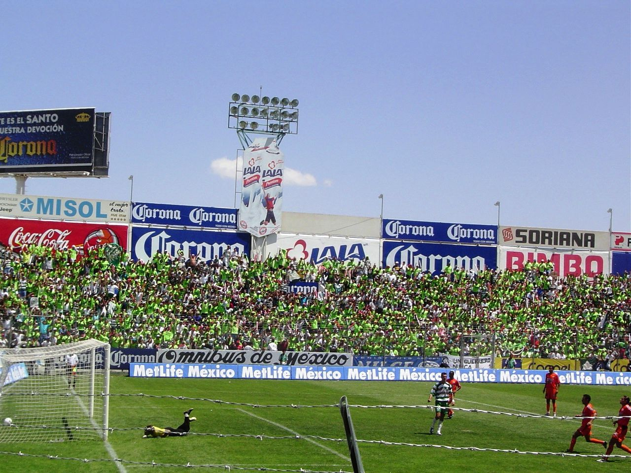 Vista del EStadio Corona